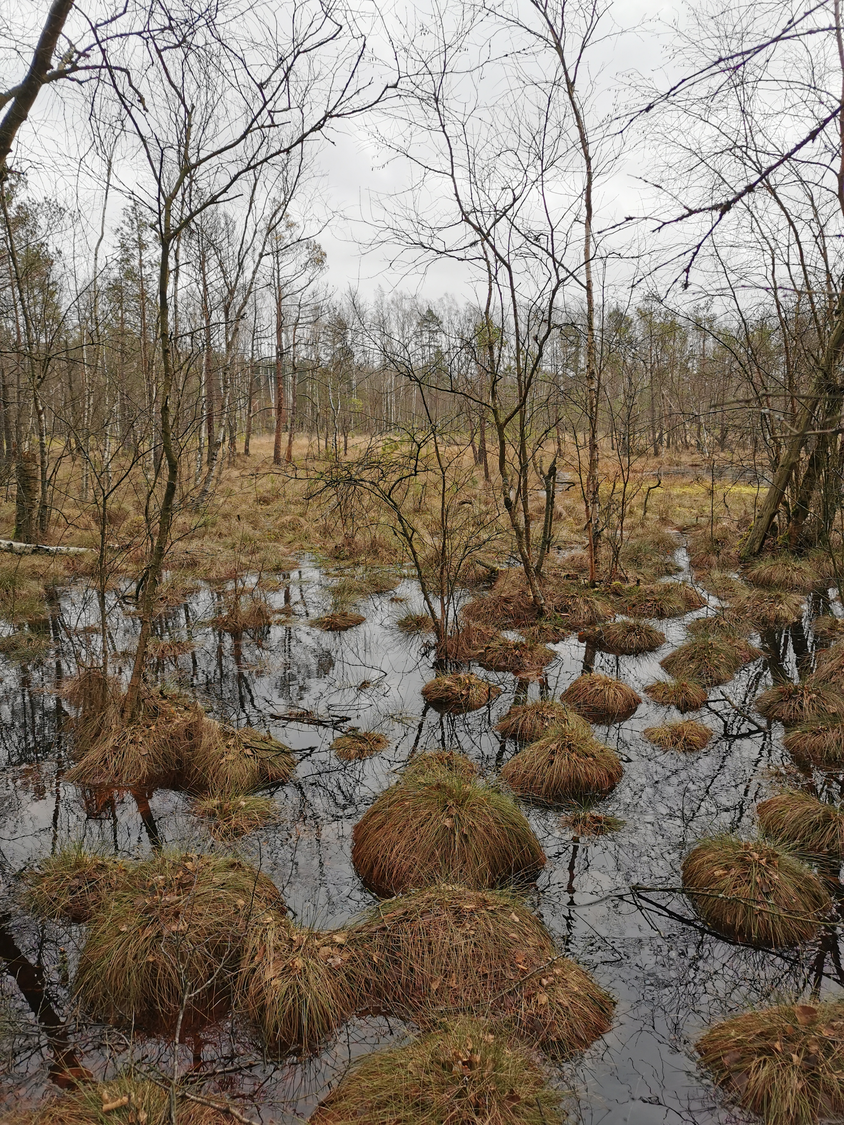 Użytek ekologiczny Moczary w gminie Dębnica Kaszubska